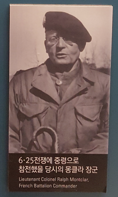 Ralph Monclar commandant du bataillon français de l'ONU pendant la guerre de Corée.